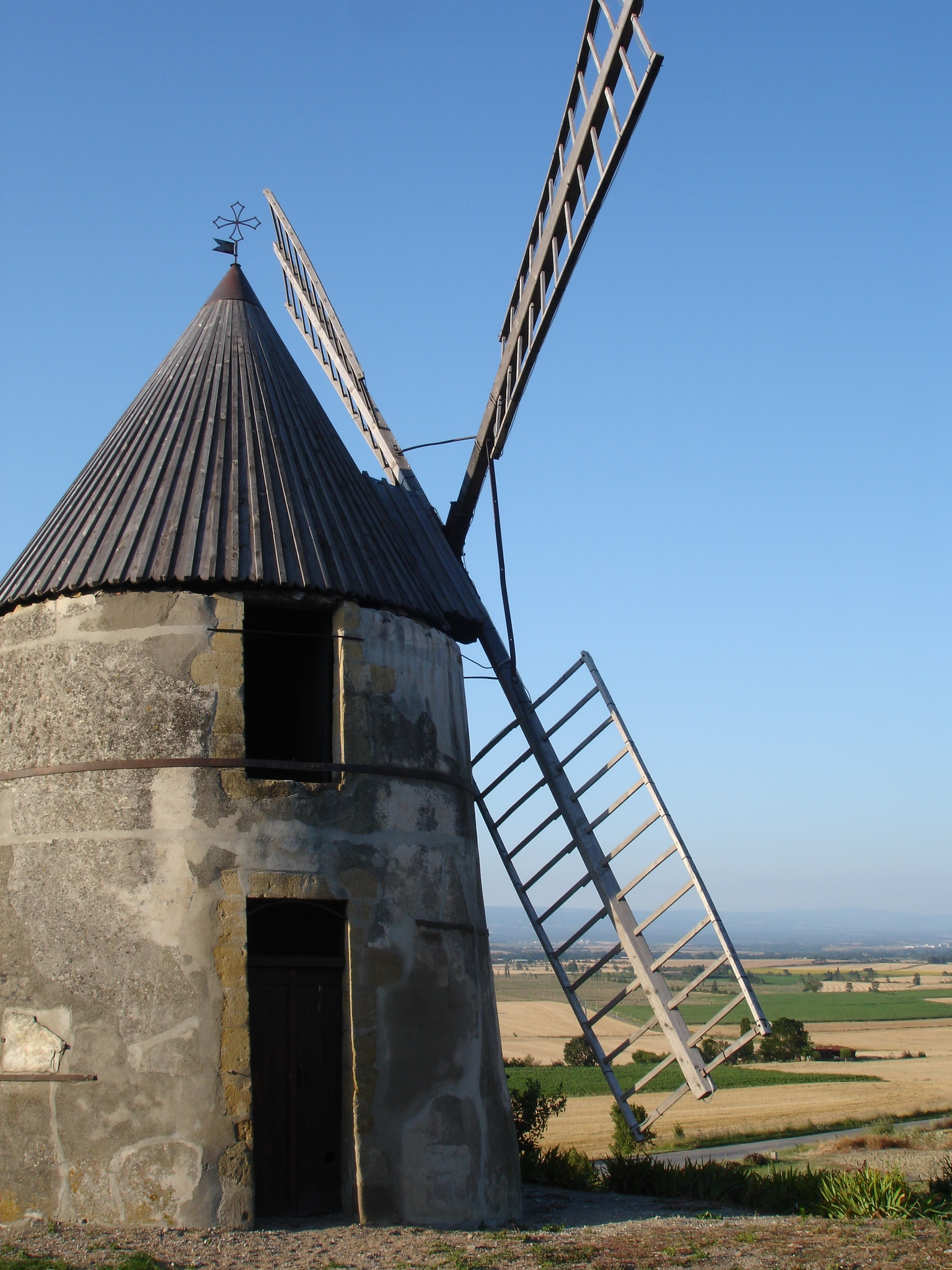 France, Aude (11), Villasavary, Moulin